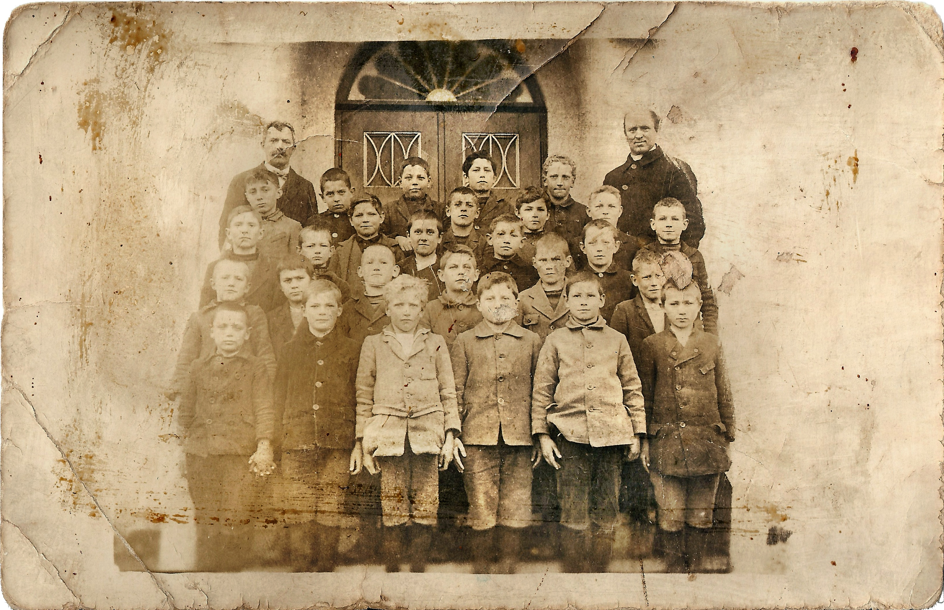 Klassenfoto vor der Volksschule Amendingen vom Jahrgang 1925